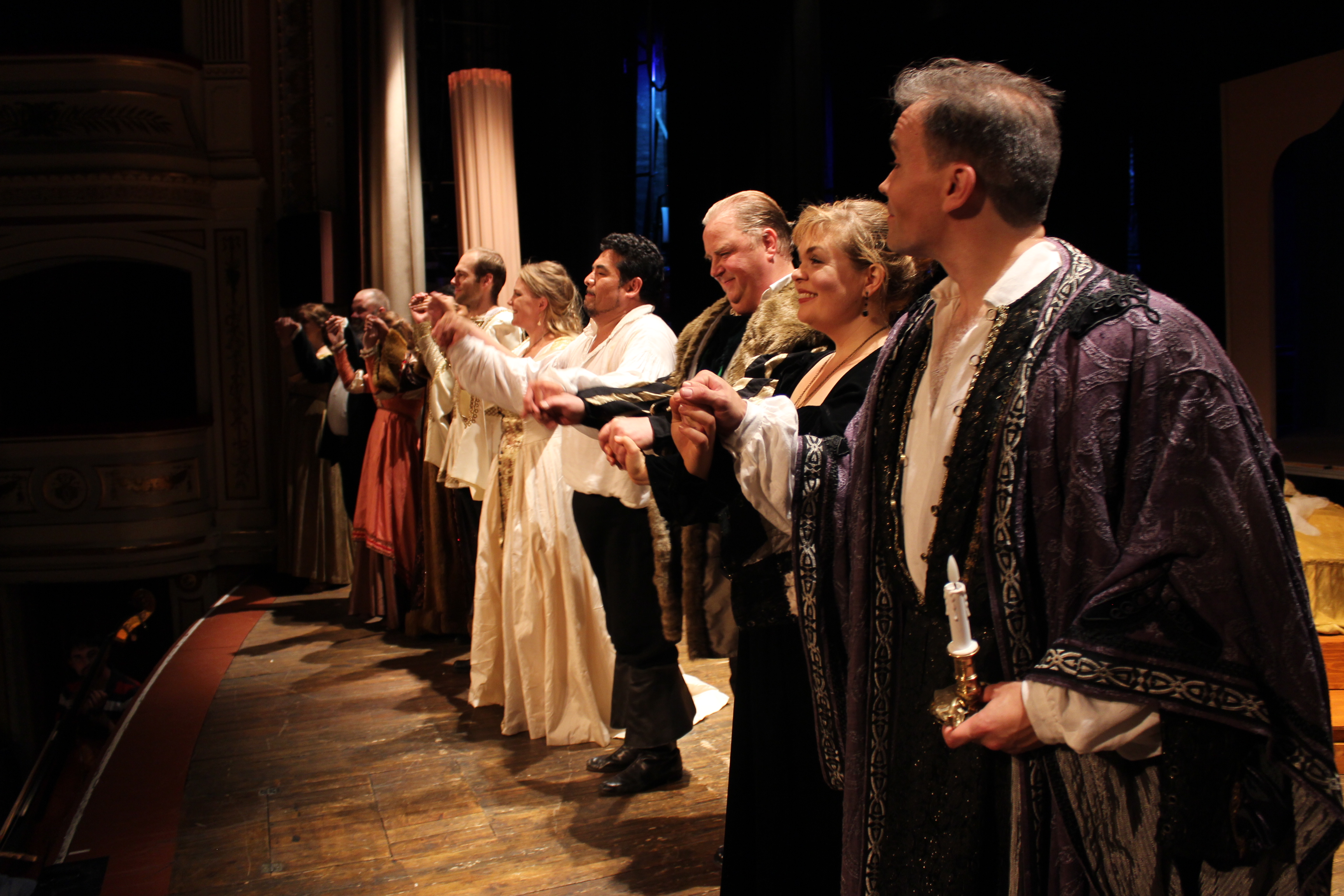 Applådtack efter en föreställning av Operafabrikens Otello på Ystads Teater, sommaren 2016. Foto: Maria Hegborn.